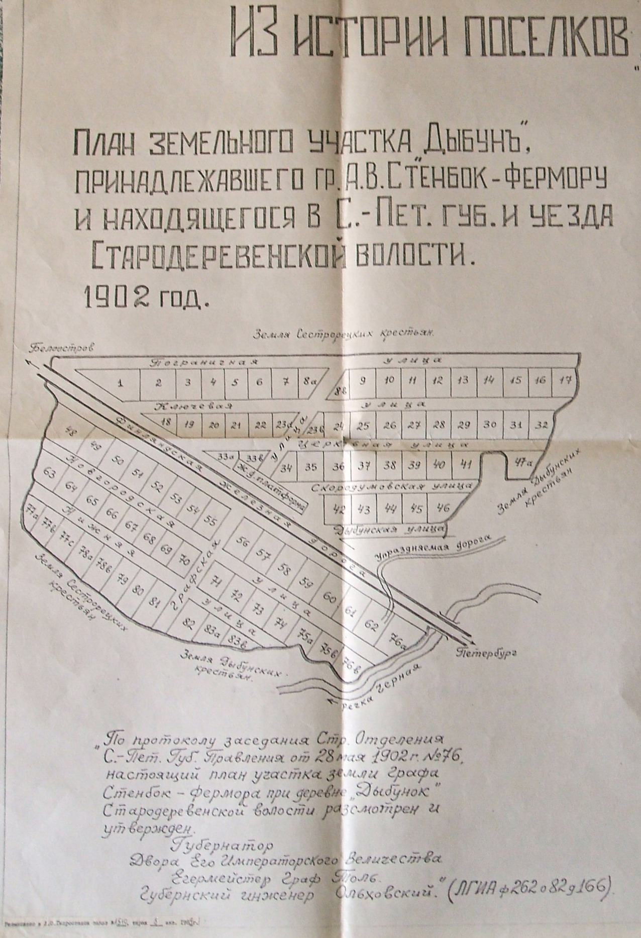 посёлок Дыбунок в 1902 году